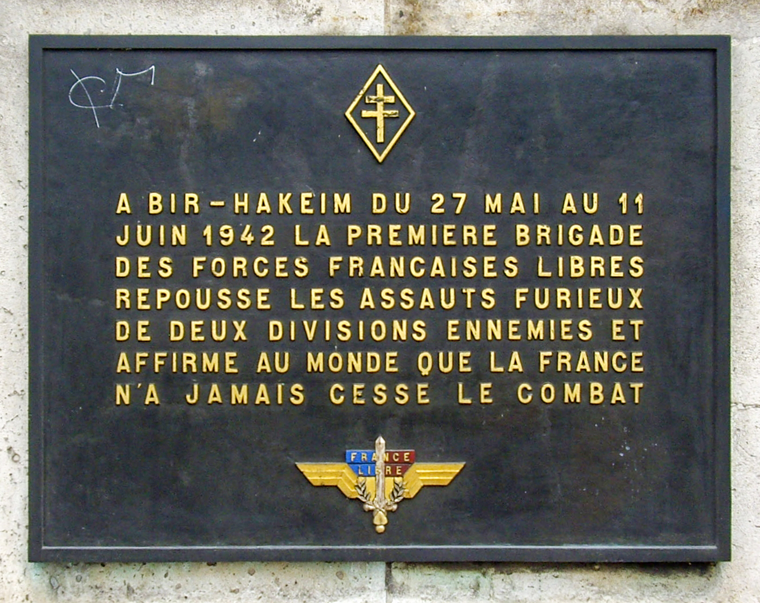 Plaque apposée sur le pont de Bir-Hakeim, Paris 15e-16e.« À Bir-Hakeim, du 27 mai au 11 juin 1942, la première brigade des Forces Françaises Libres repousse les assauts furieux de deux divisions ennemies et affirme au monde que la France n'a jamais cessé le combat. »